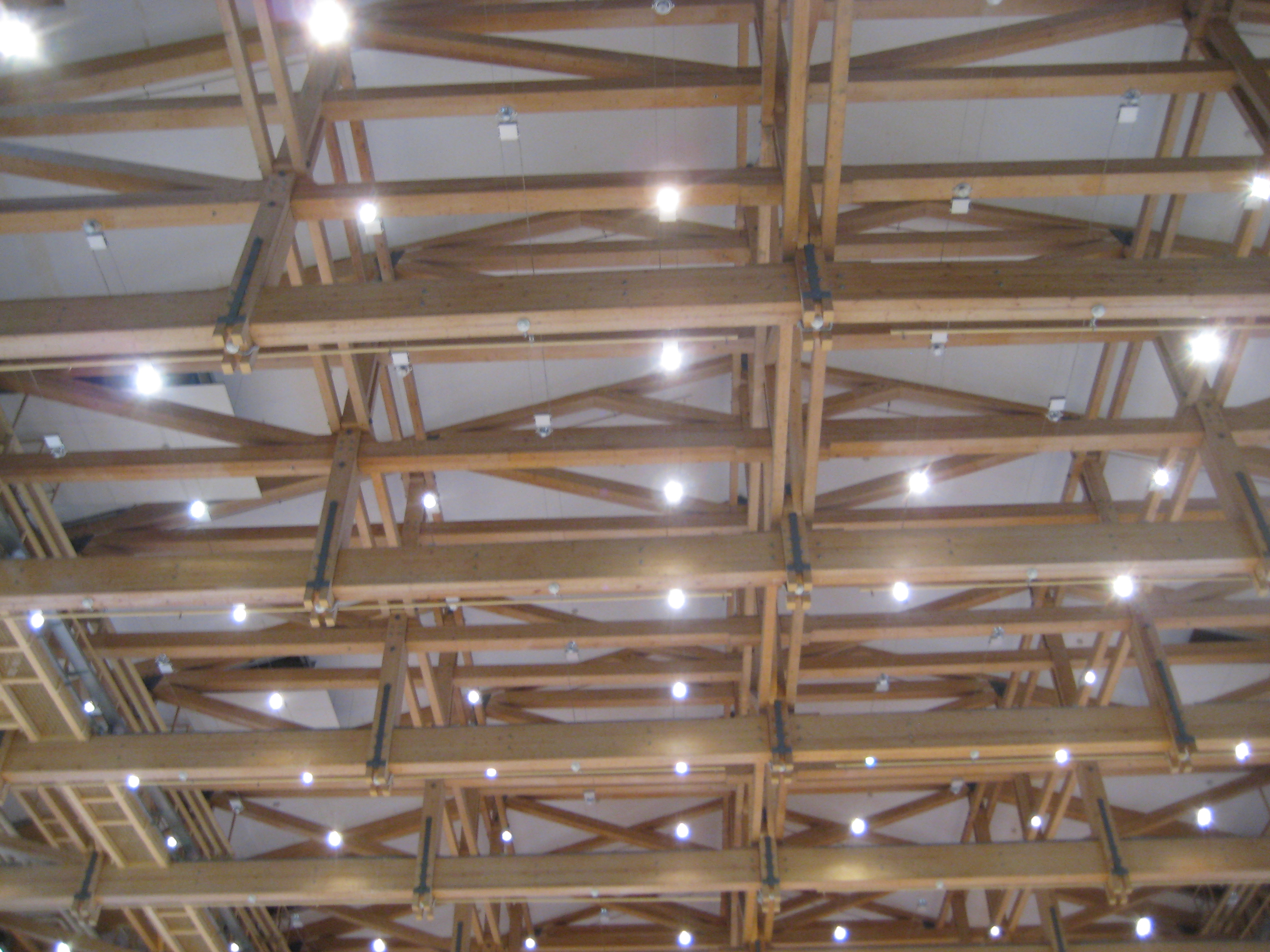 Московский Манеж. Интерьер